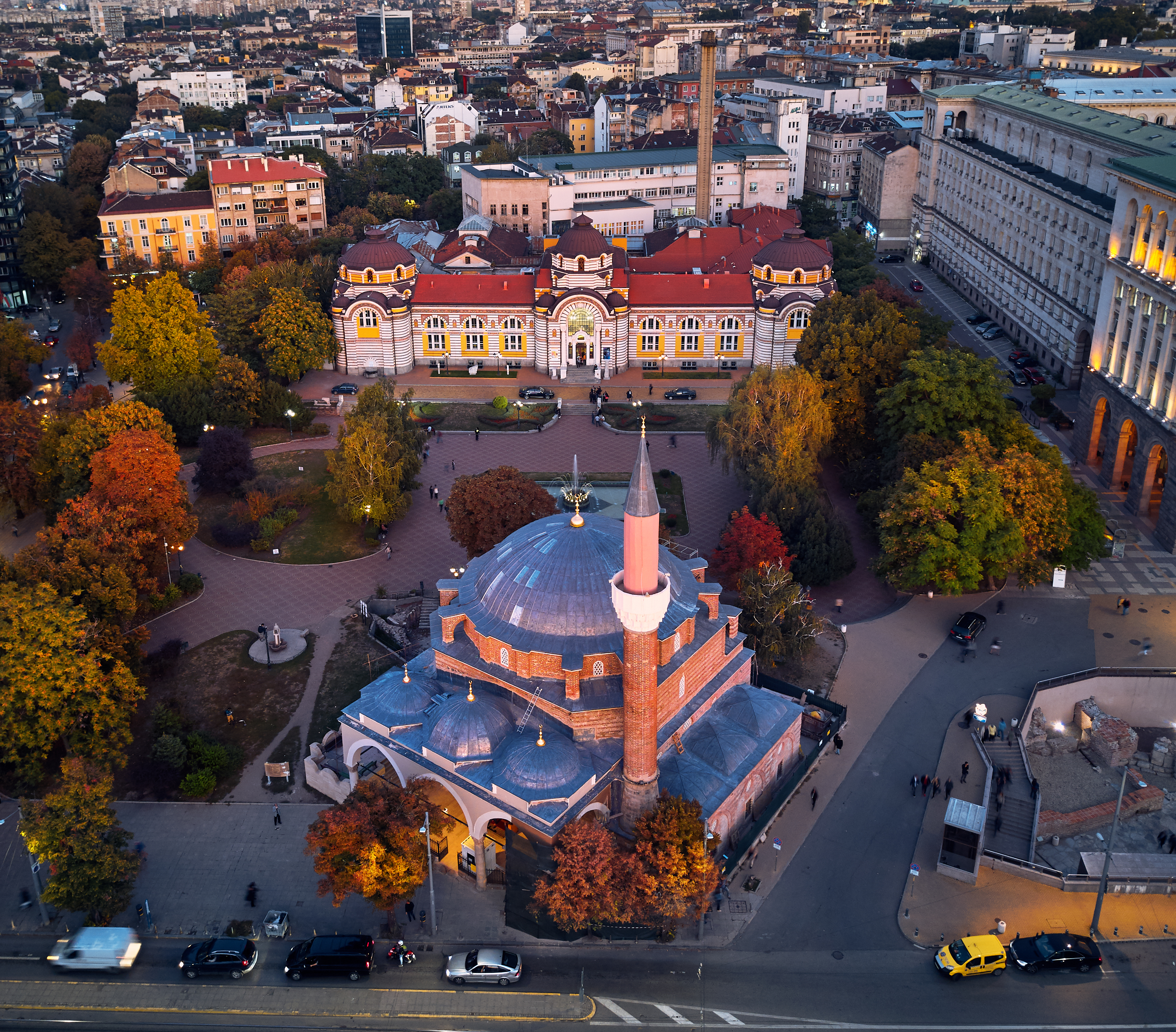 Banya Bashi Mosque